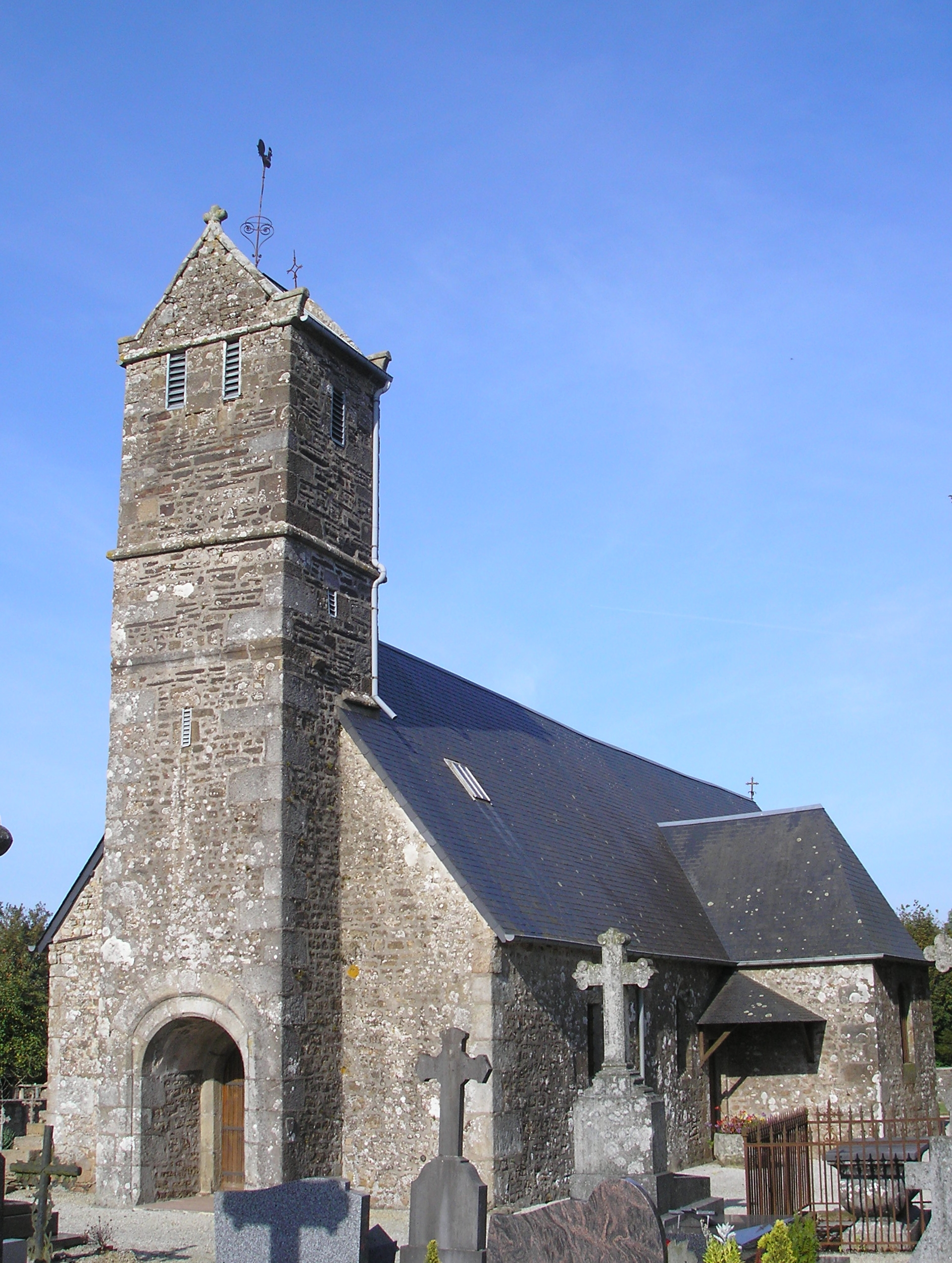 Fontenermont (Normandie, France). L'église Saint-Martin.